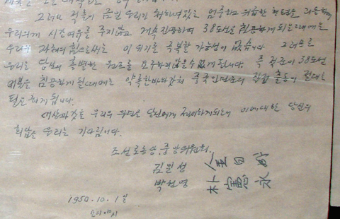 박헌영과 김일성 명의로 된 편지, 작자 미상